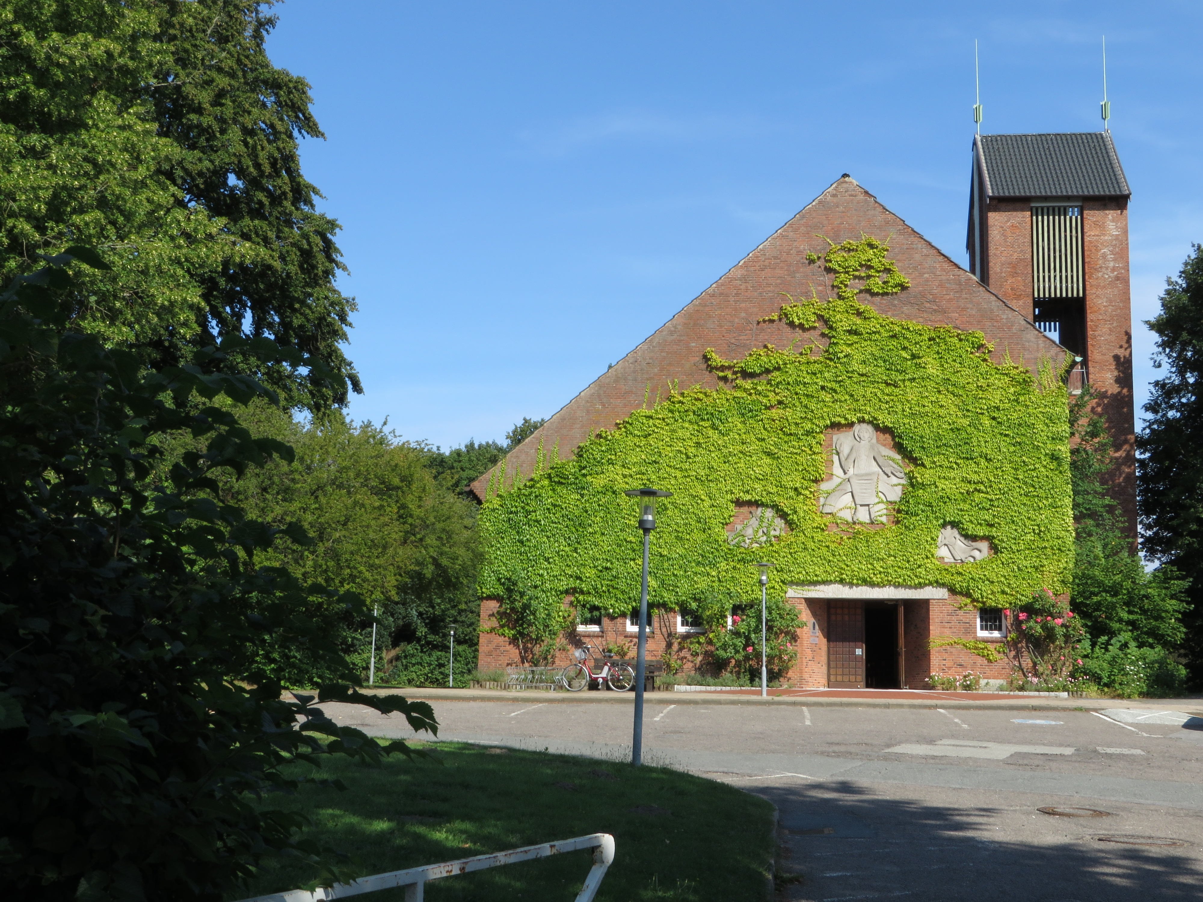 Christuskirche (Flensburg-Mürwik, Juli 2014), Bild 03